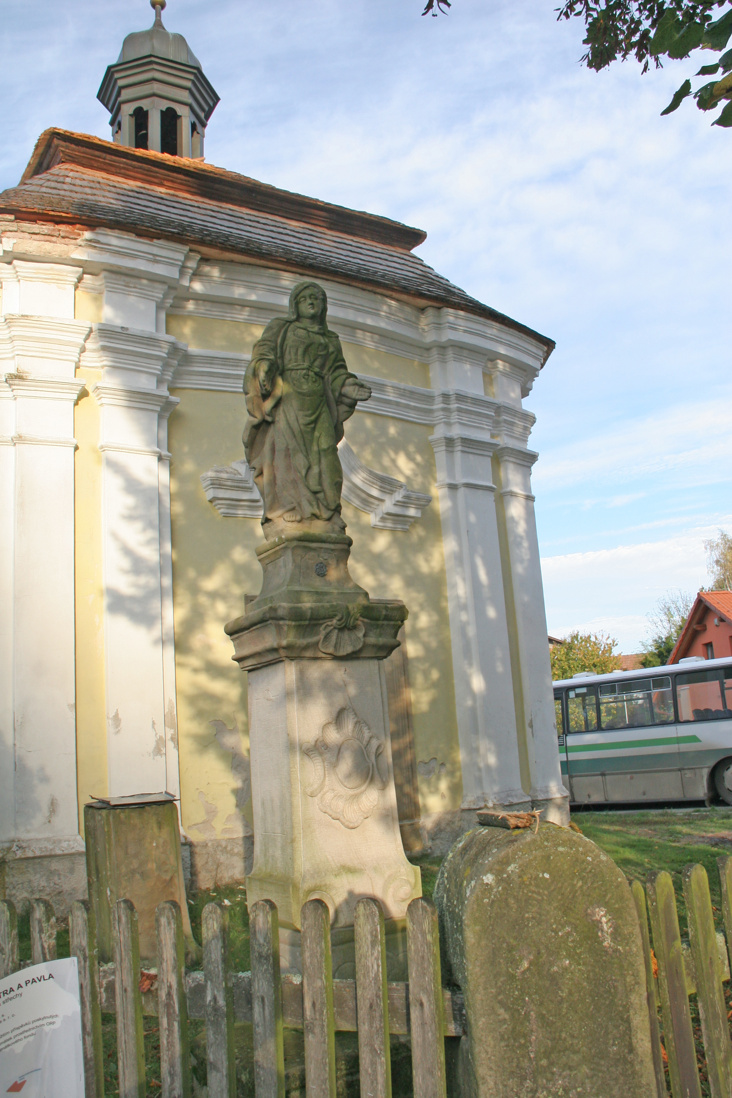 Kaple svatých Petra a Pavla, Příchvoj.